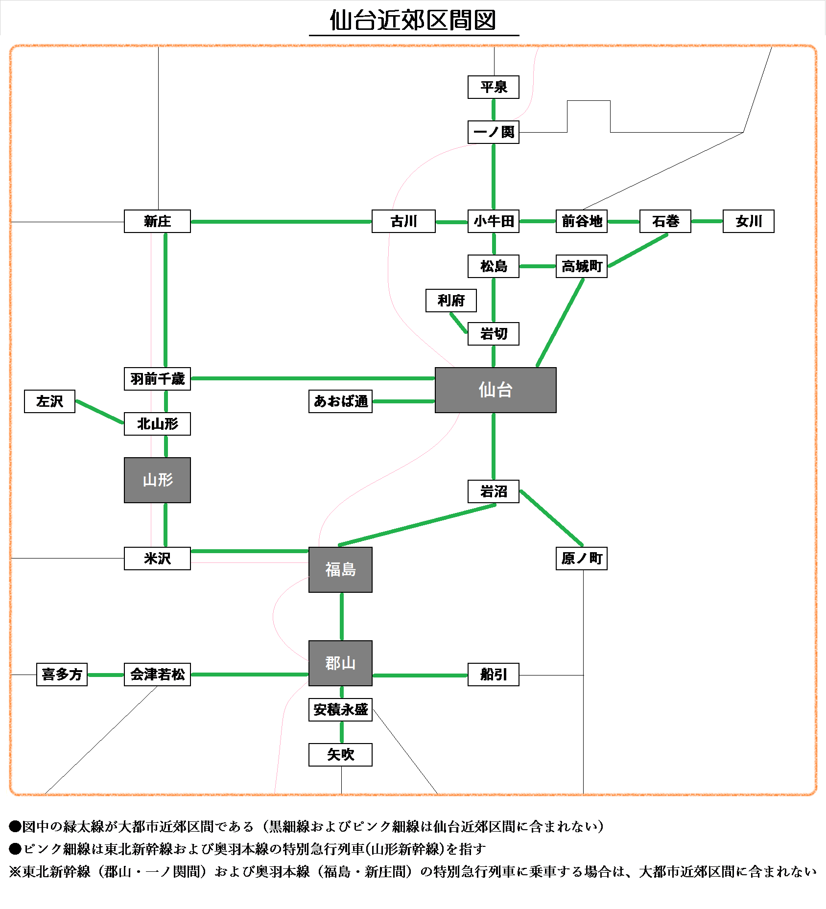 仙台近郊区間の路線図